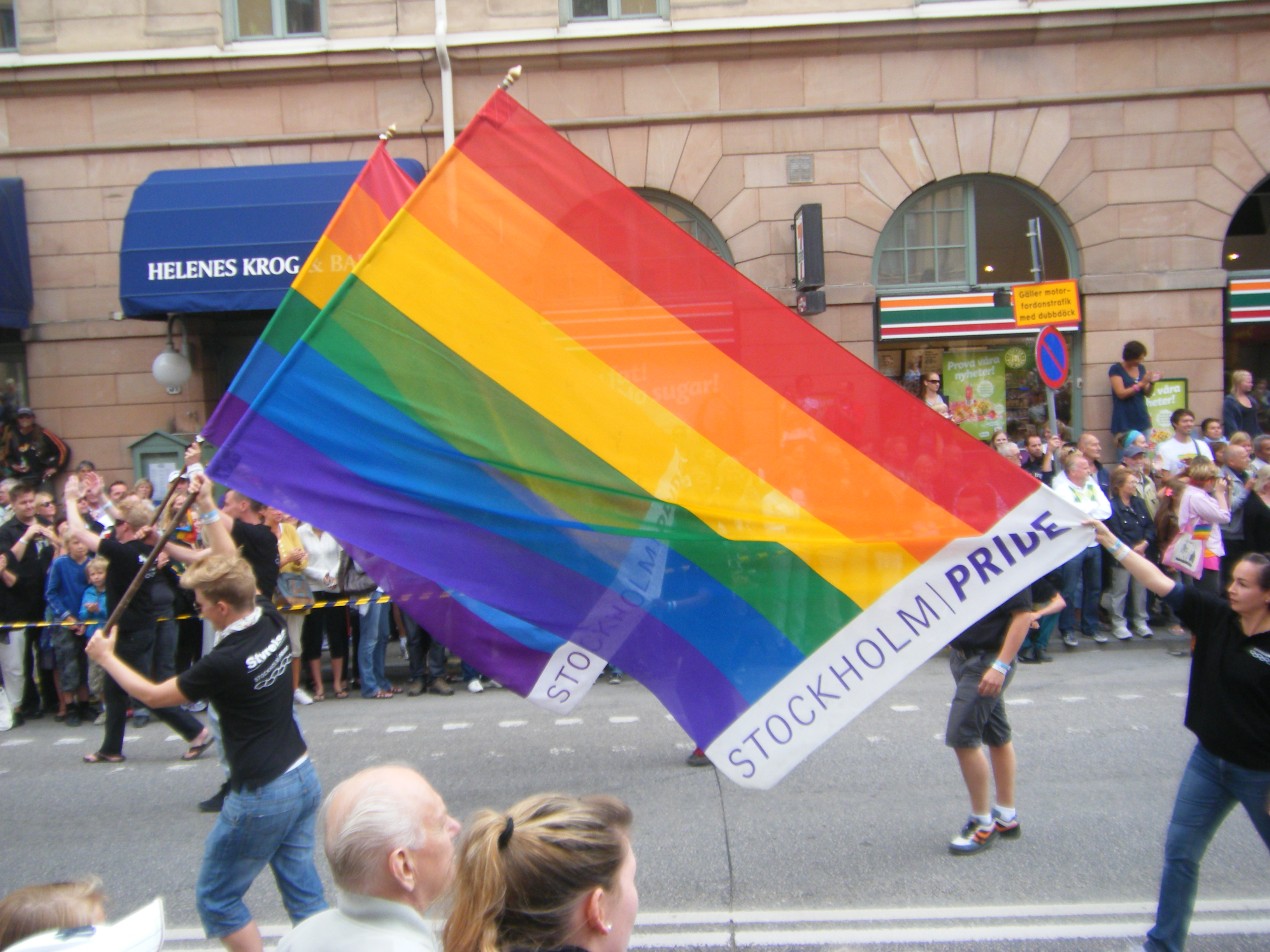 Stockholm Pride 2010 at Hornsgatan